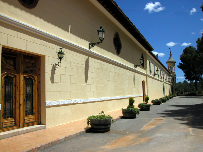 Bodega Masde Bazan winery